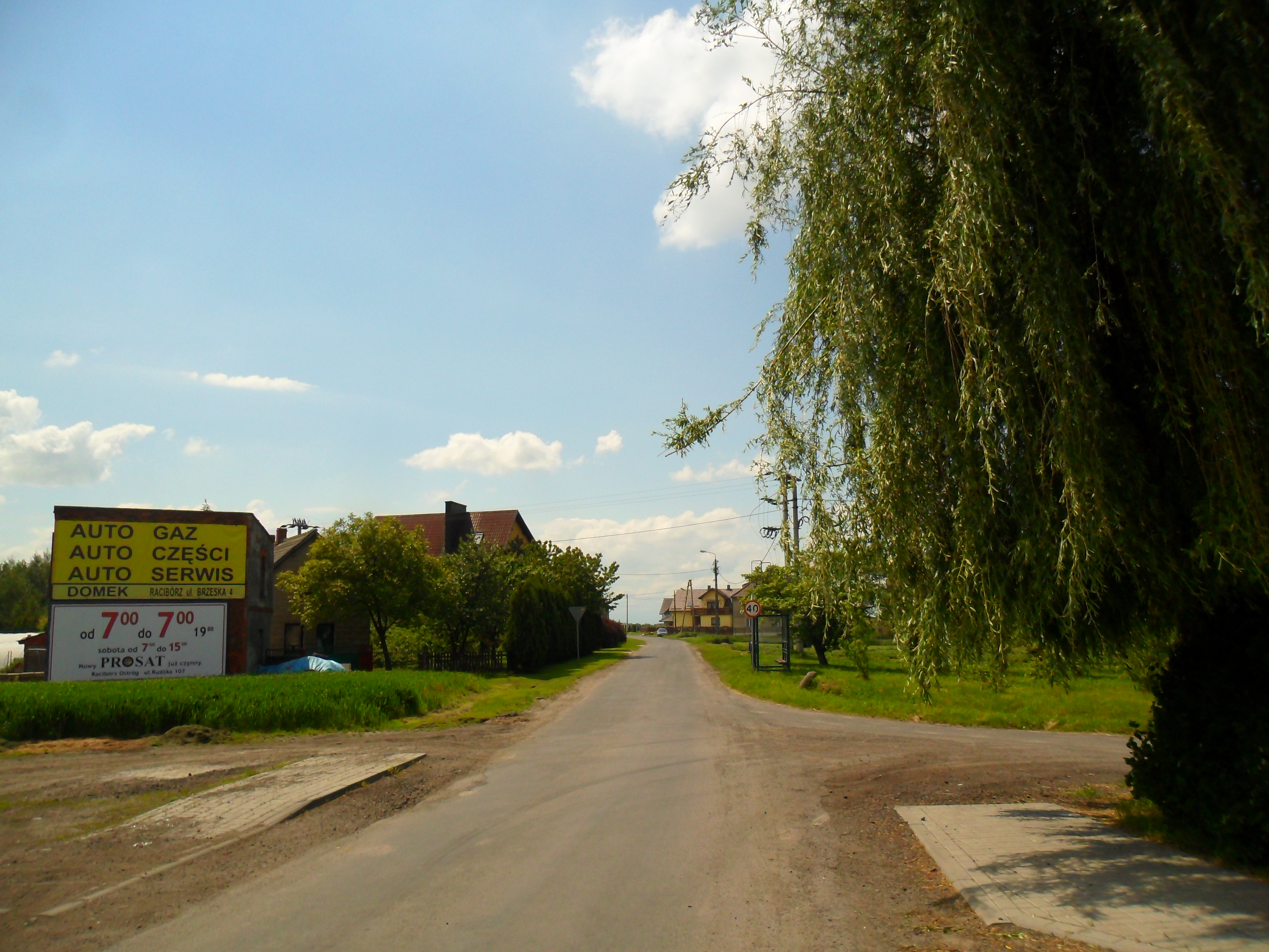 Żerdziny, gmina Pietrowice Wielkie